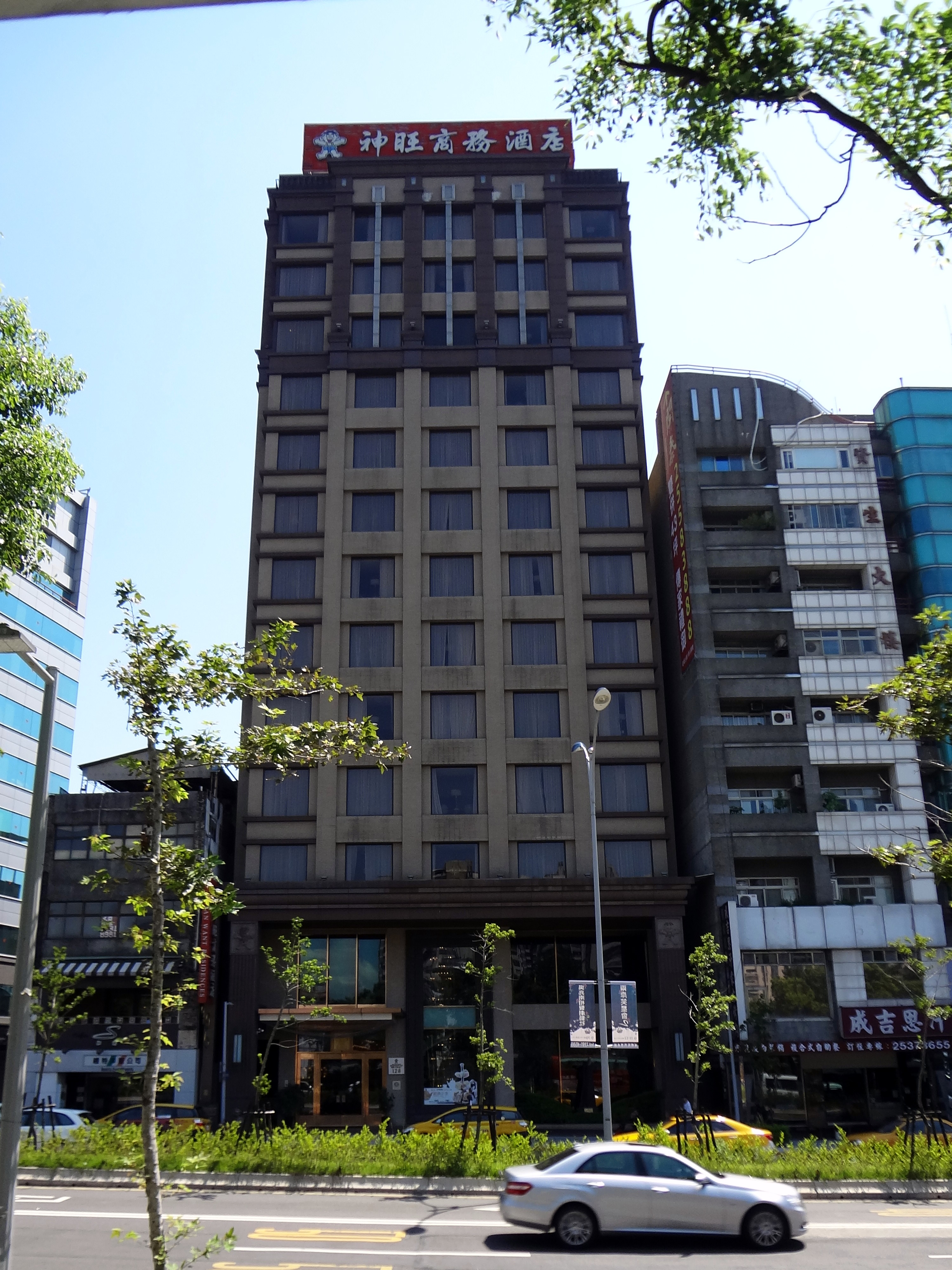 神旺商務酒店，位於臺灣臺北市中山區南京東路一段128號。